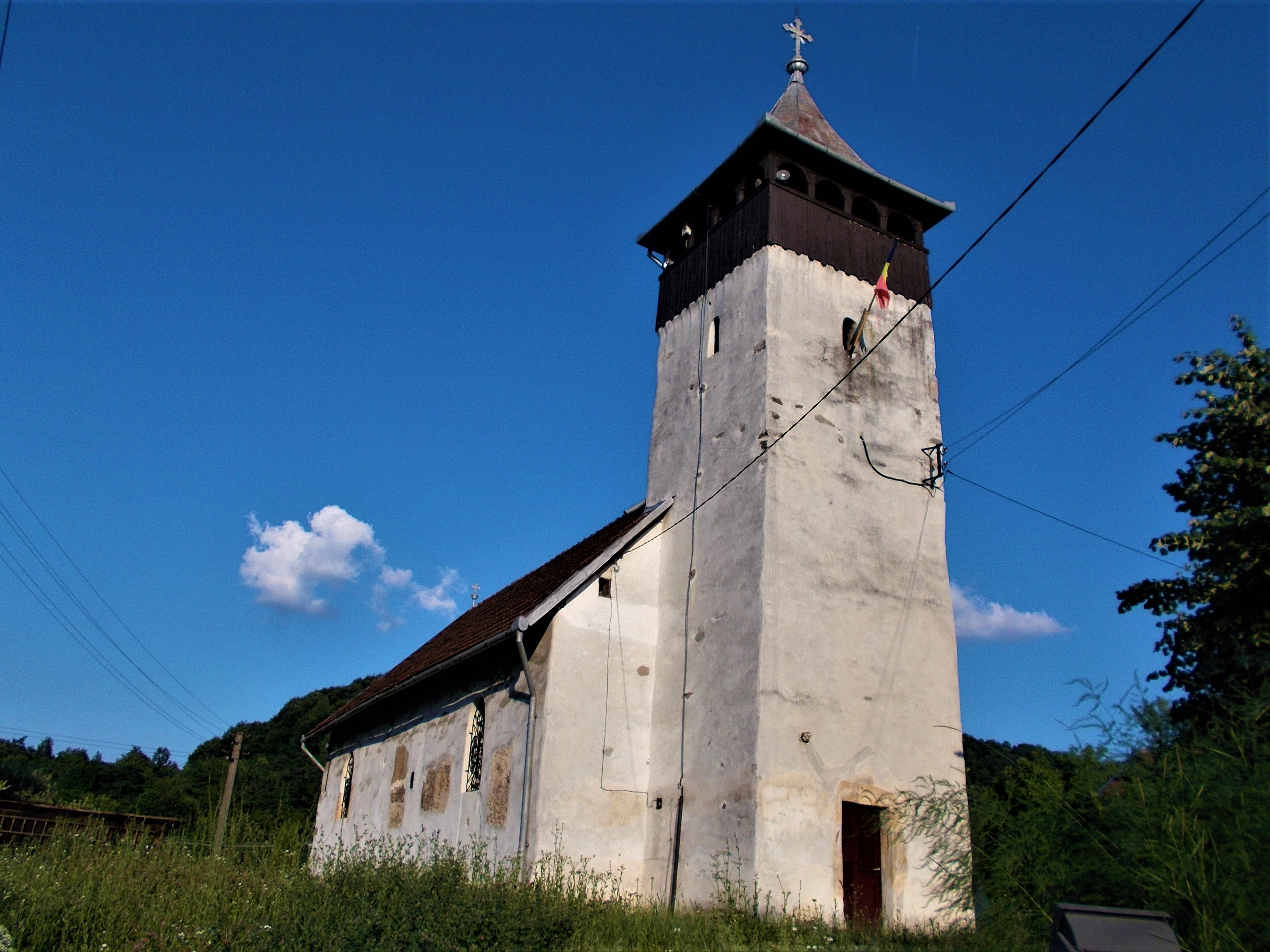 Biserica „Adormirea Maicii Domnului” din Crișcior, județul Hunedoara